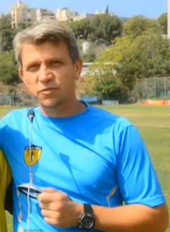 ז'אן טלנסיקוב עוזר מאמן בבית"ר ירושלים